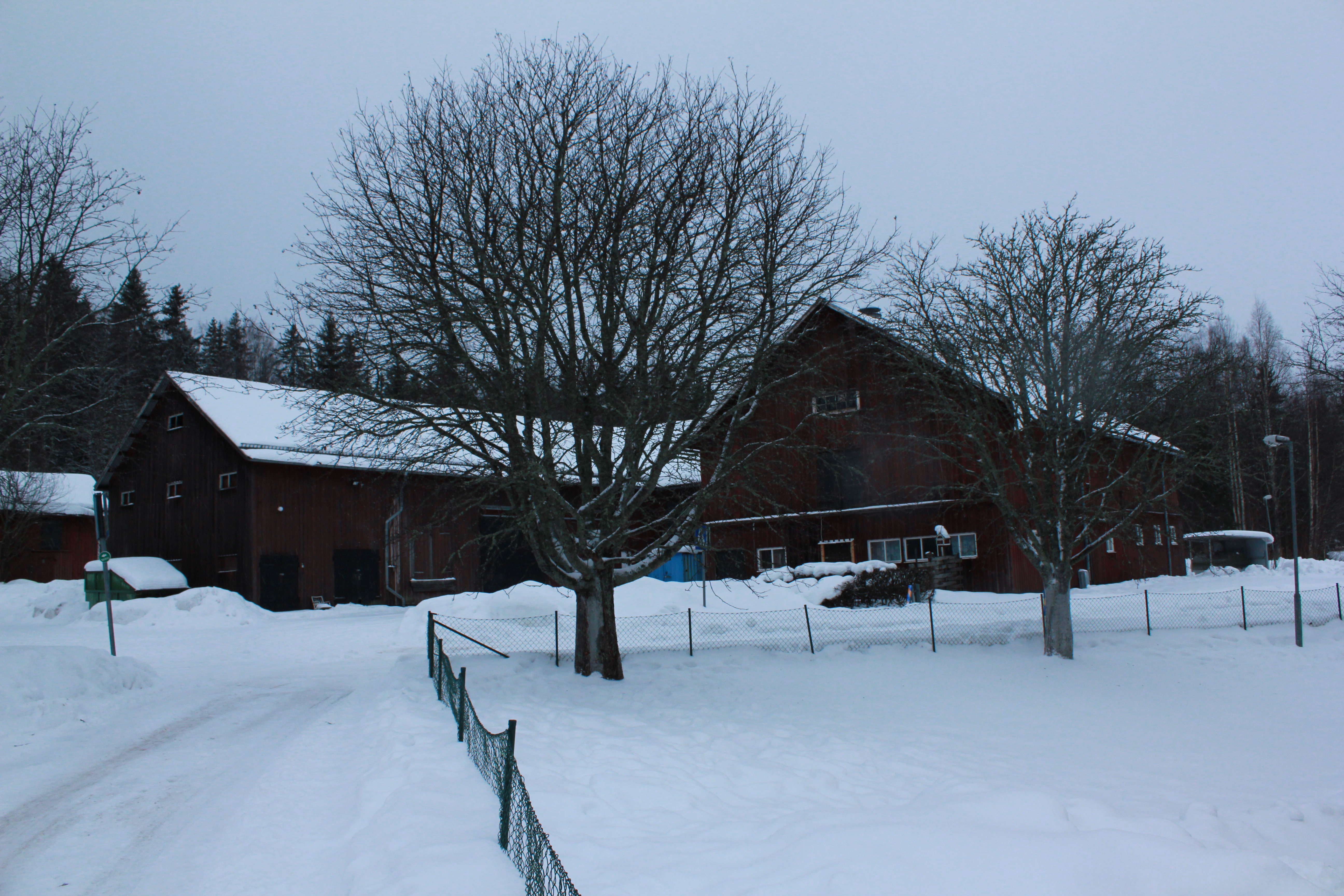 Haggårdens gamla jordbruksbyggnader. Hedemora, Dalarna, Sverige.